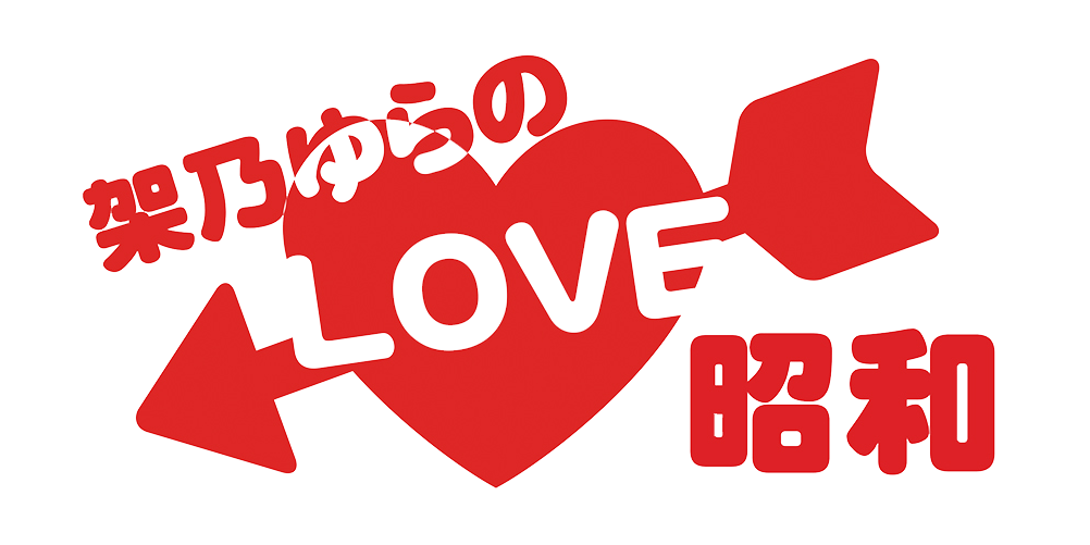 Kano Yura Love Showa2020番組ロゴ